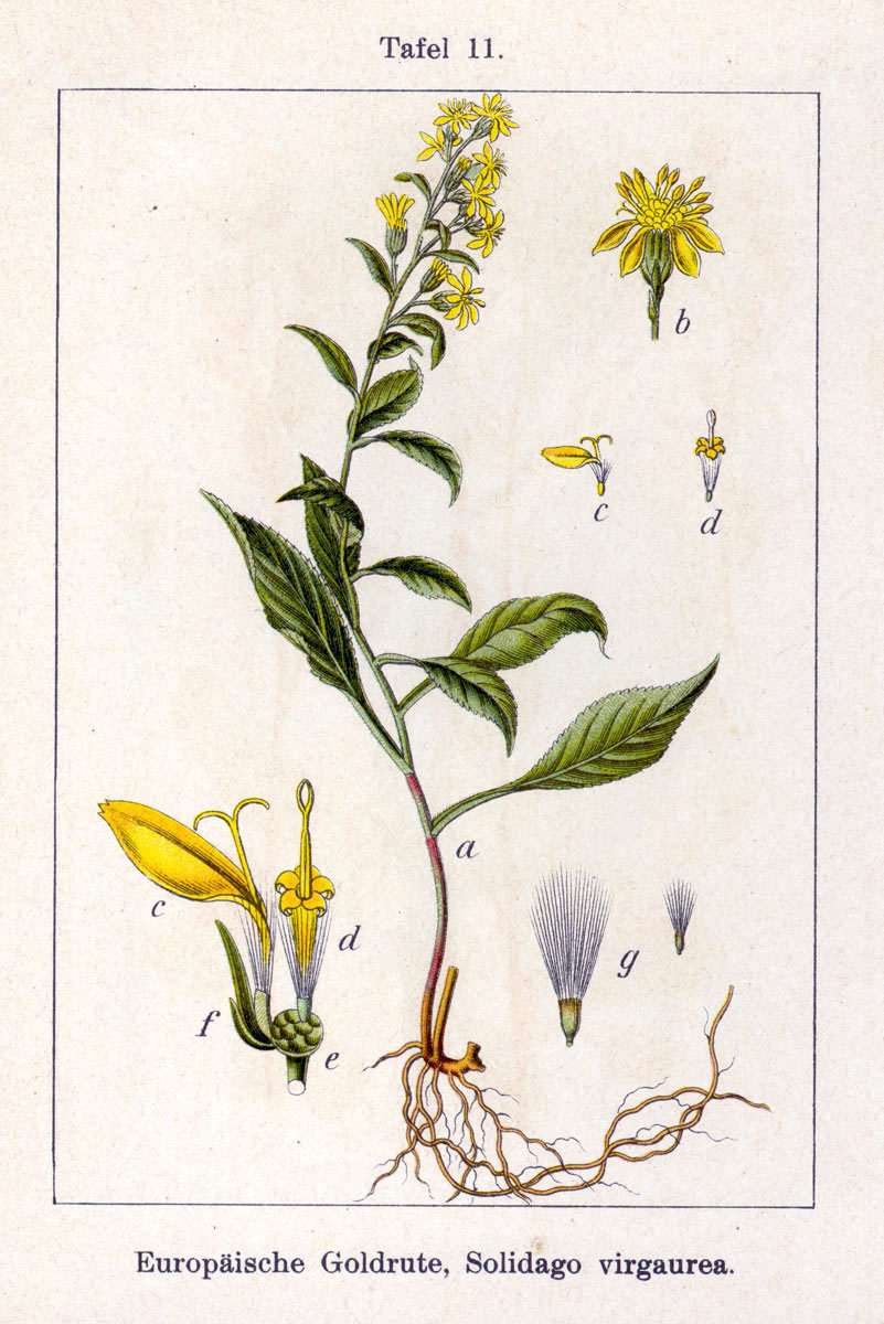 Solidago virgaurea L. Original Description Europäische Goldrute, Solidago virgaurea